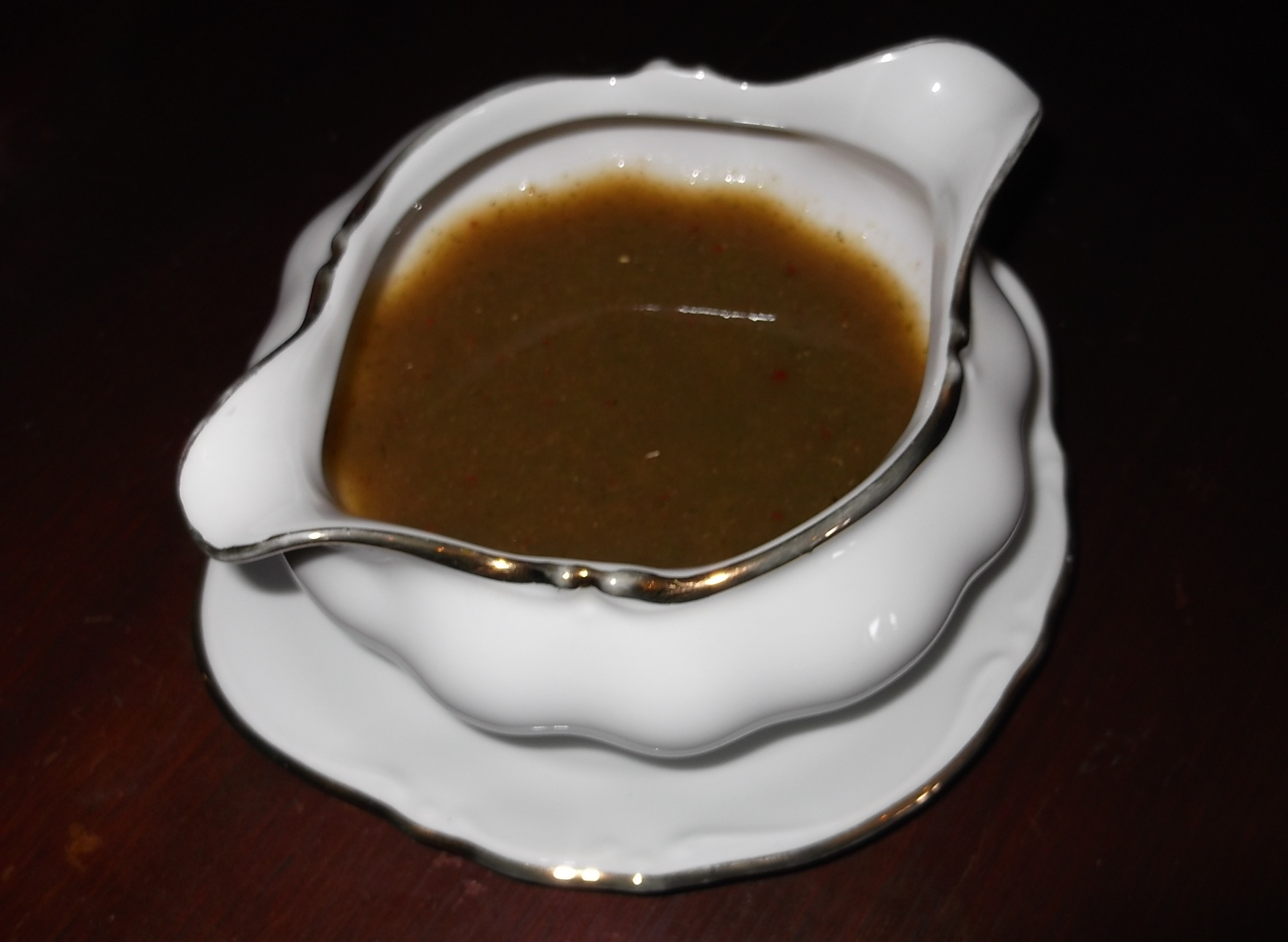 Tkemali (sauce du myrobolan)